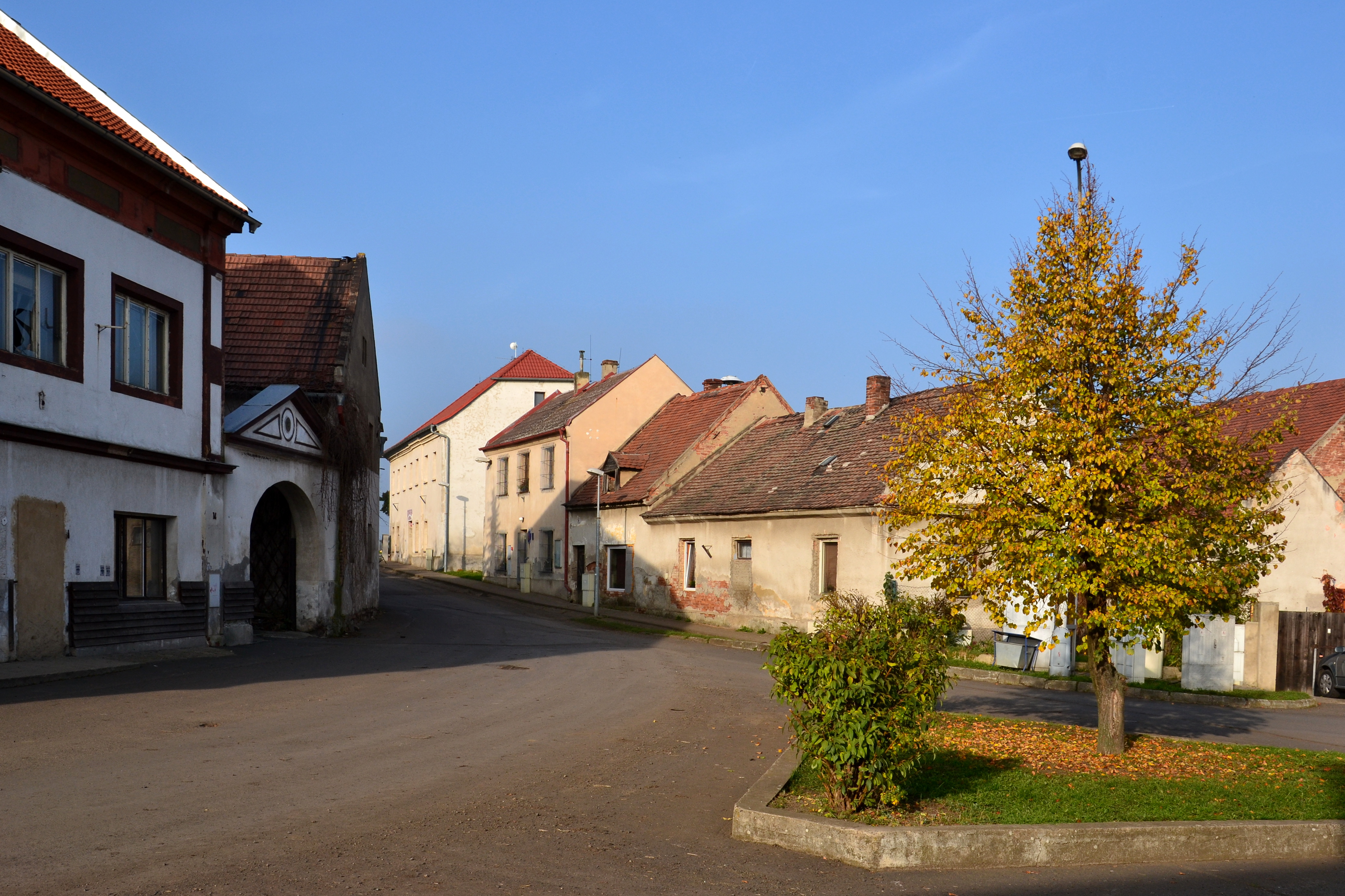 Všestudy - ulice s obecním úřadem